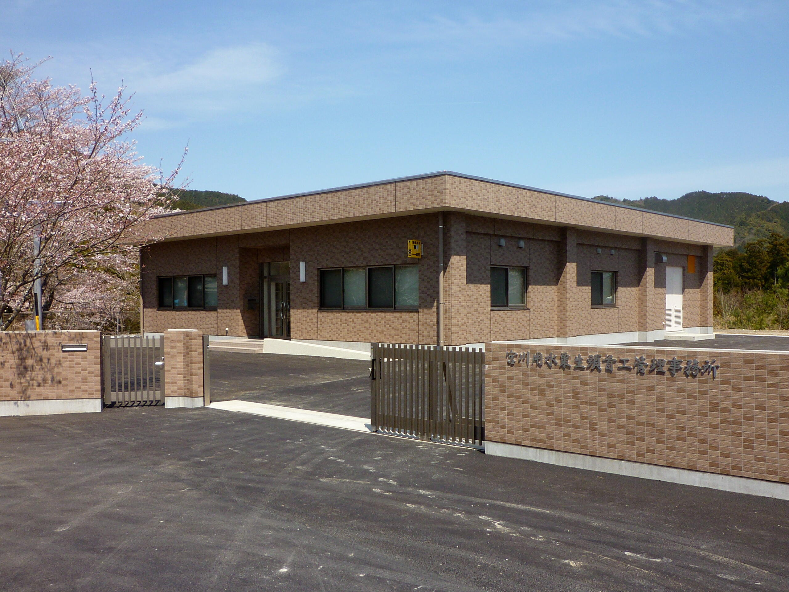 宮川用水粟生頭首工管理事務所